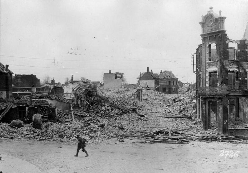 Die Schlacht im Westen. Blick in eine Strasse des unter schwerem engl. Feuer liegenden Lens. (Aisneschlacht). 2726 BUFA